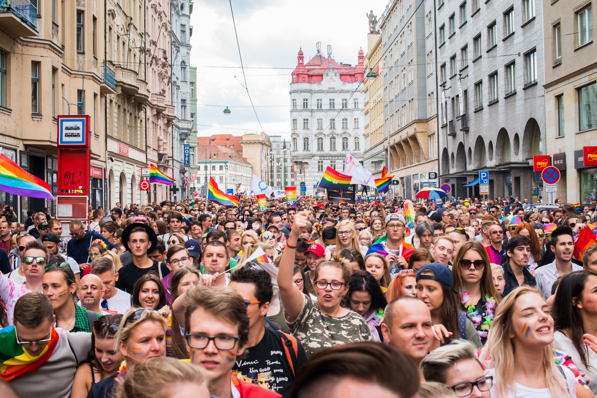 Průvod Prague Pride v sobotu 12.8. na Václavském náměstí v Praze.